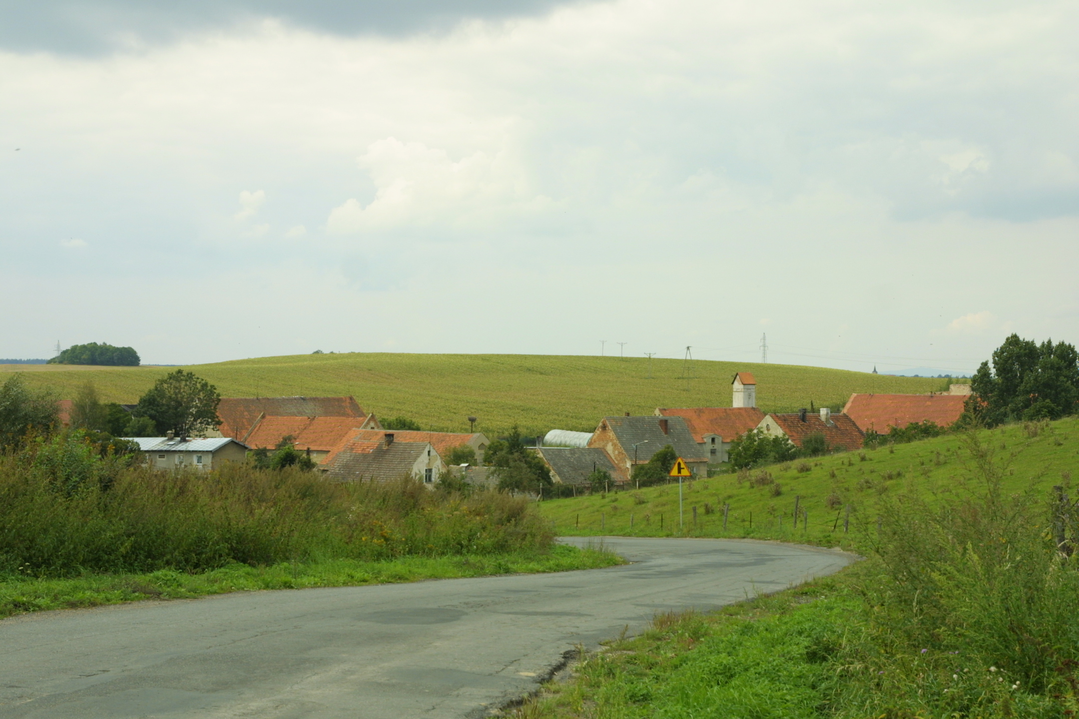 Lipa - wieś w powiecie ząbkowickim